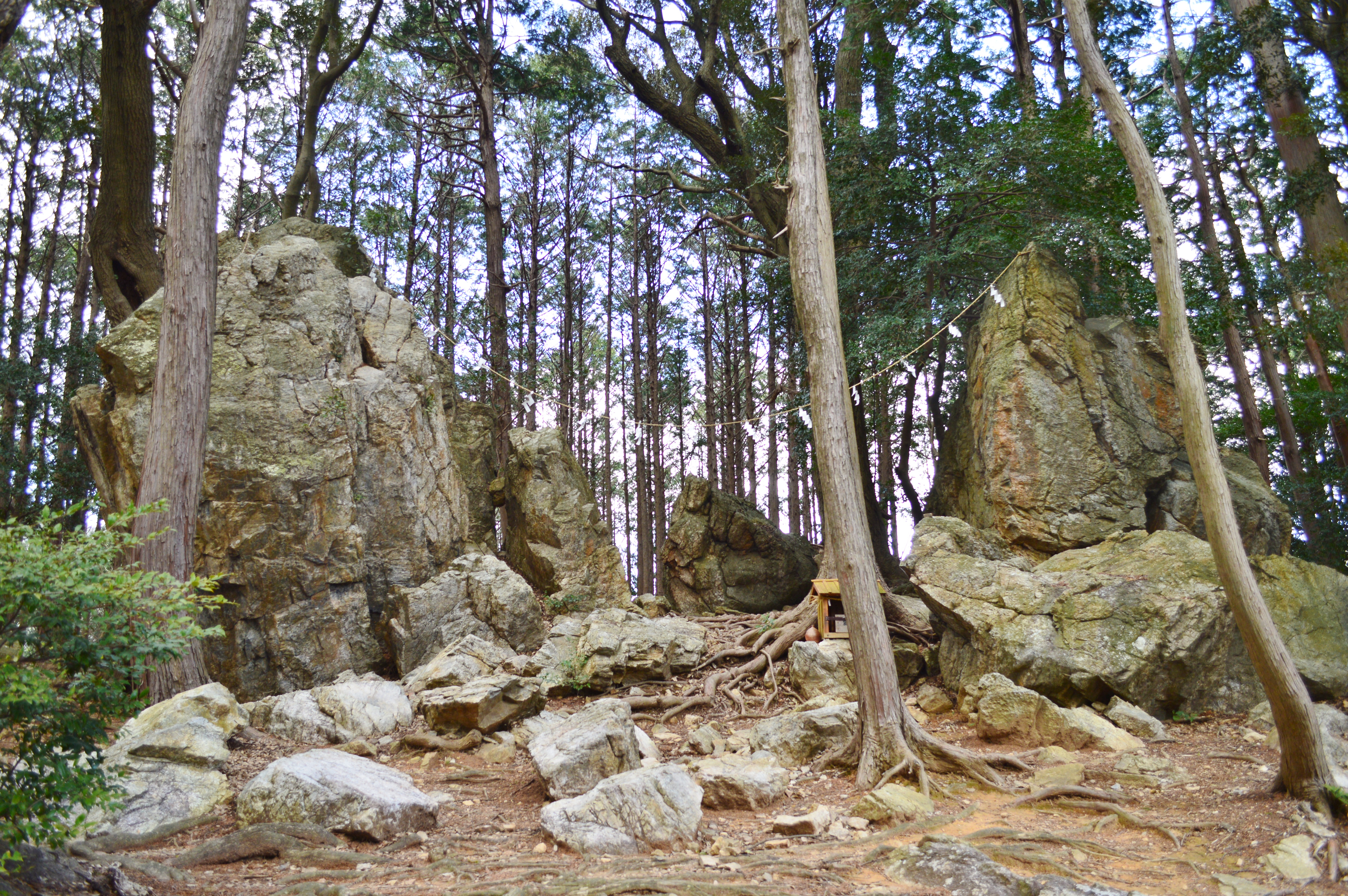 天白磐座遺跡 全体